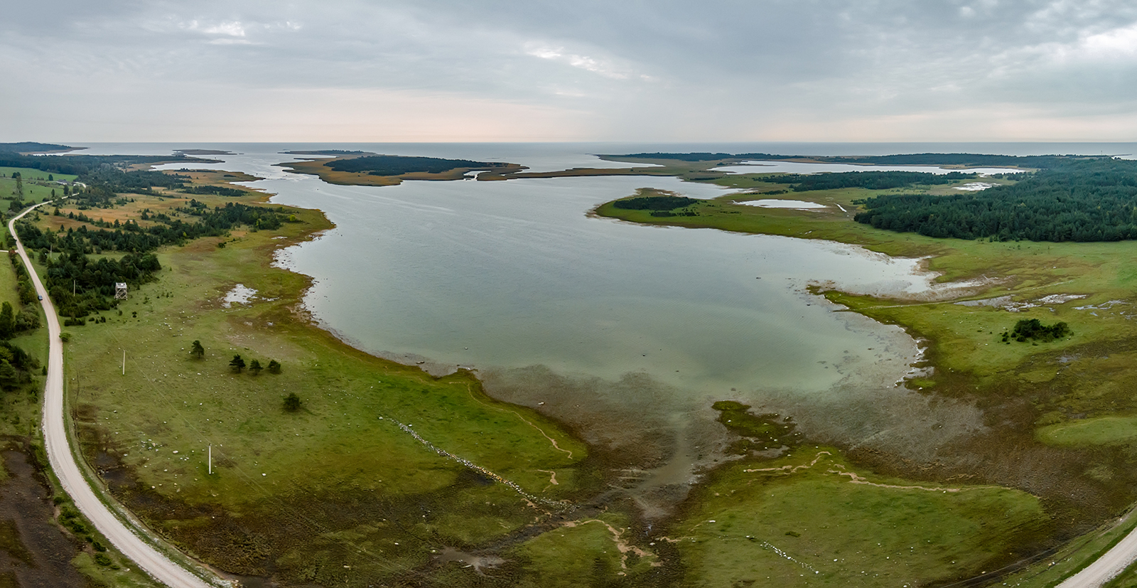 Sõmeri hoiuala